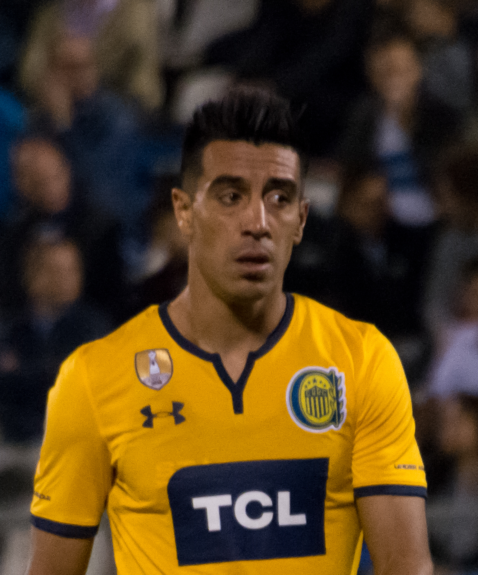 Washington Camacho, Universidad Católica v Rosario Central, Estadio San Carlos de Apoquindo, Las Condes, Santiago, Chile.